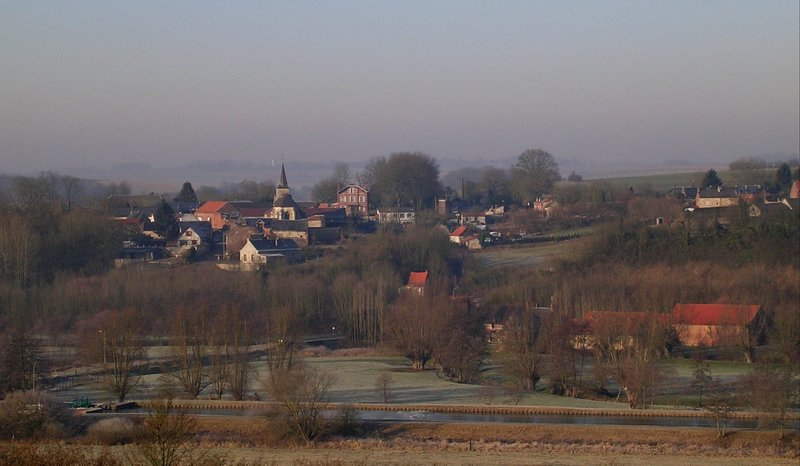 Panorama pris en hiver